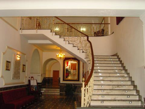 Hall del Teatro Lope de Vega de Ocaña (Toledo).